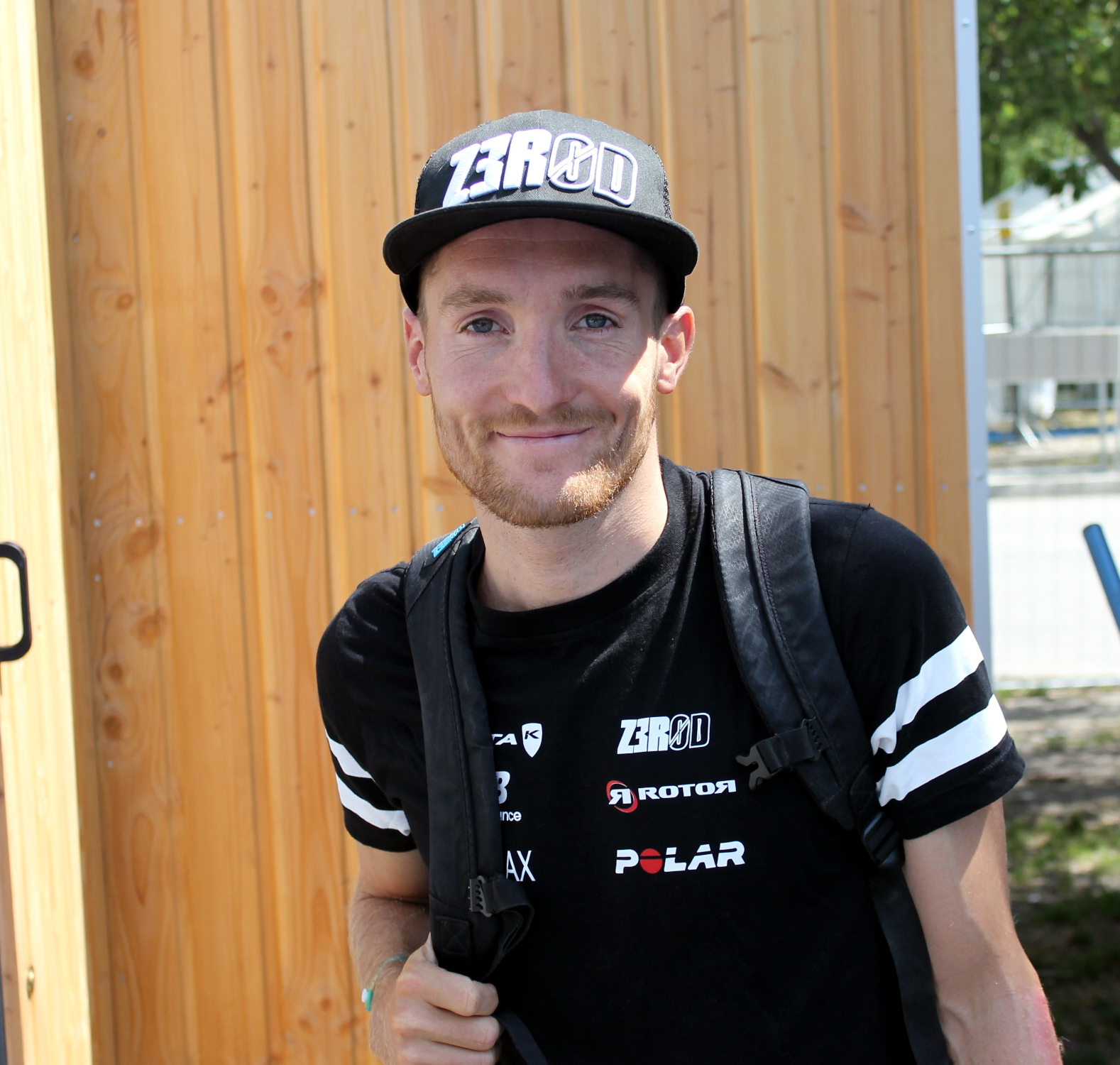 Étienne Diemunsch Embrunman 2017